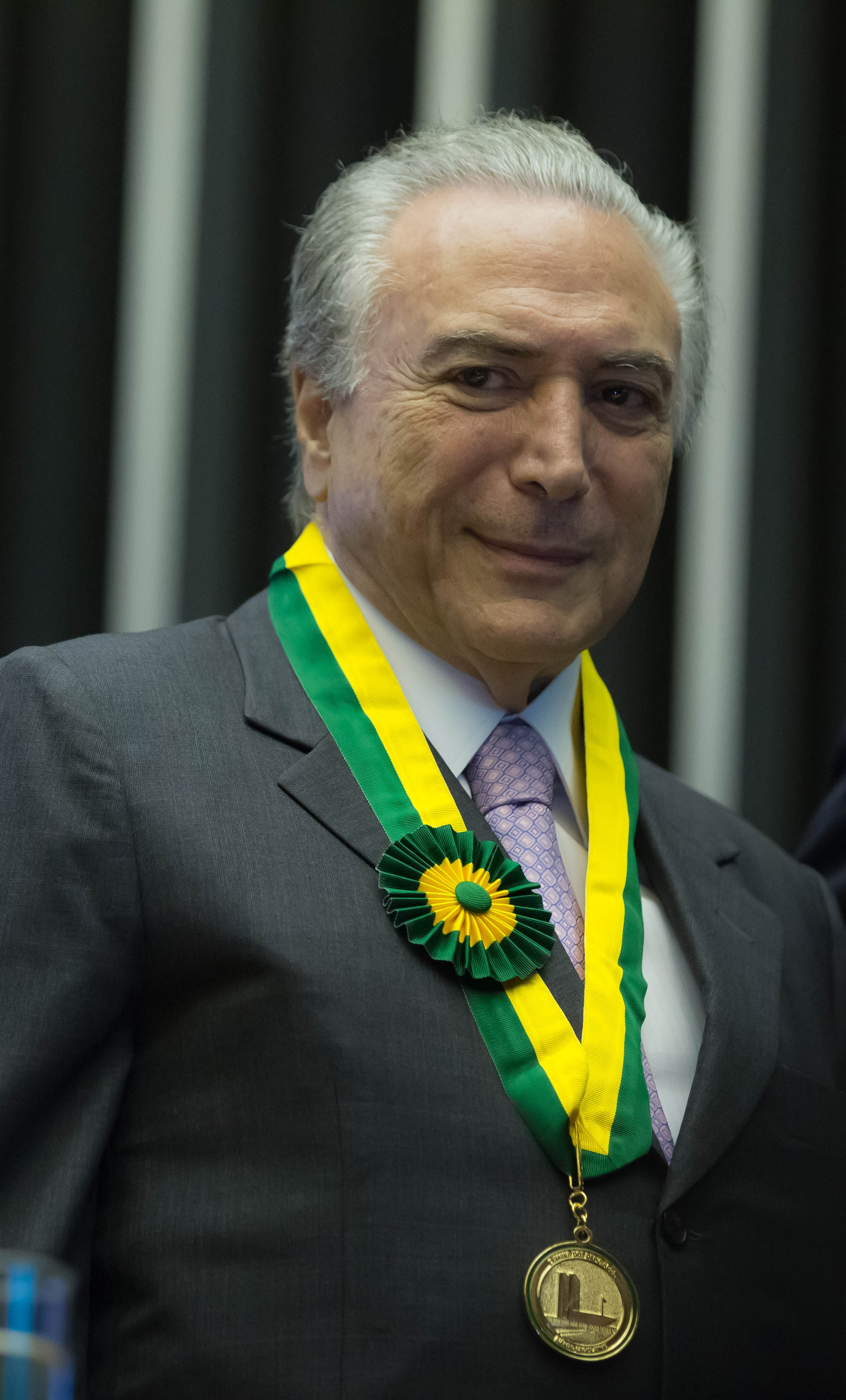 18-11-2015 Vice-presidente Michel Temer é condecorado na solenidade de entrega da "Medalha Mérito Legislativo".